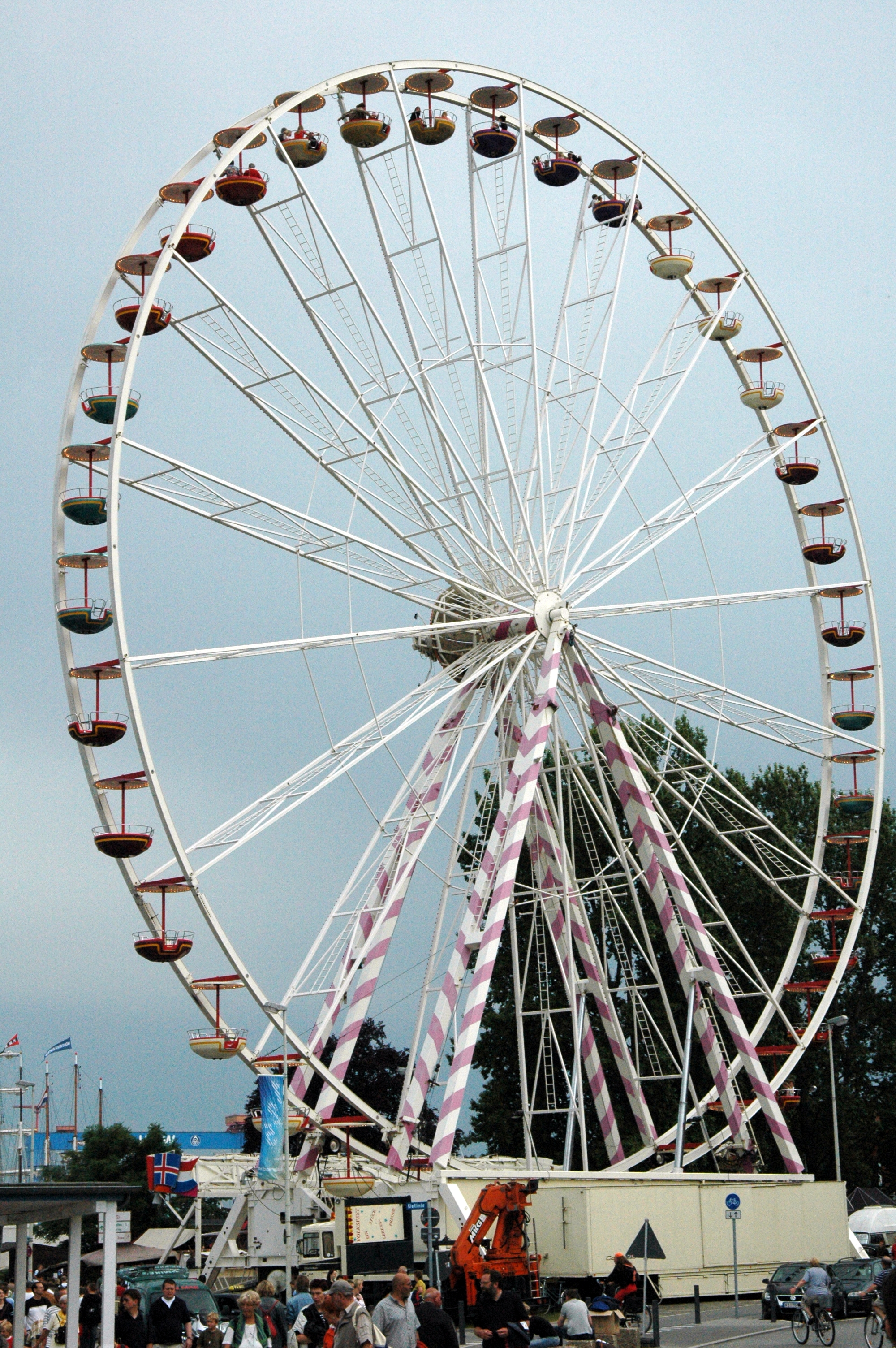 Riesenrad auf der Kieler Woche 2007